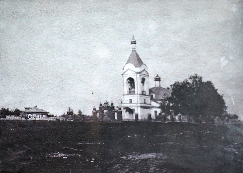 Башкортостан. Иглинский район. Охлебинино. Церковь Троицы Живоначальной.